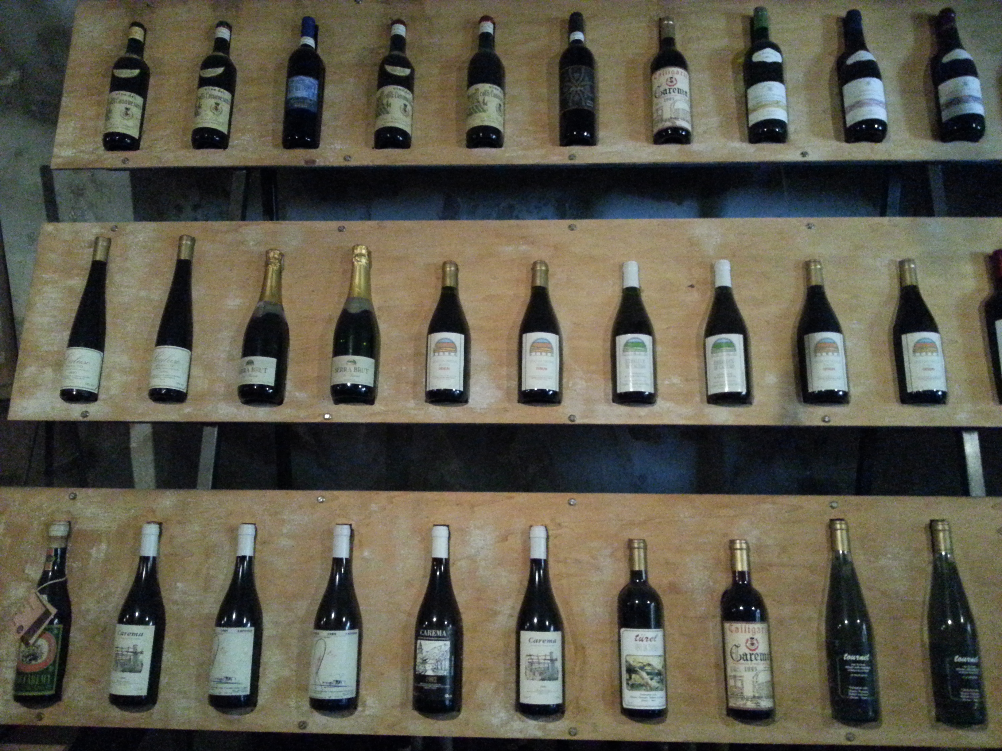 Andamo ai Balmit, San Germano - fraz. di Borgofranco d'Ivrea, Piemonte